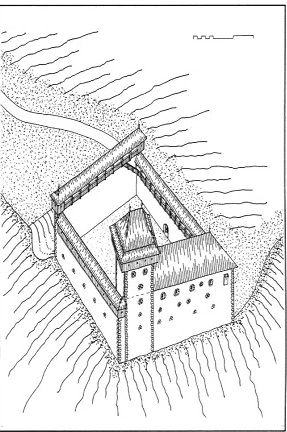 Grad Raka 13. stoletje